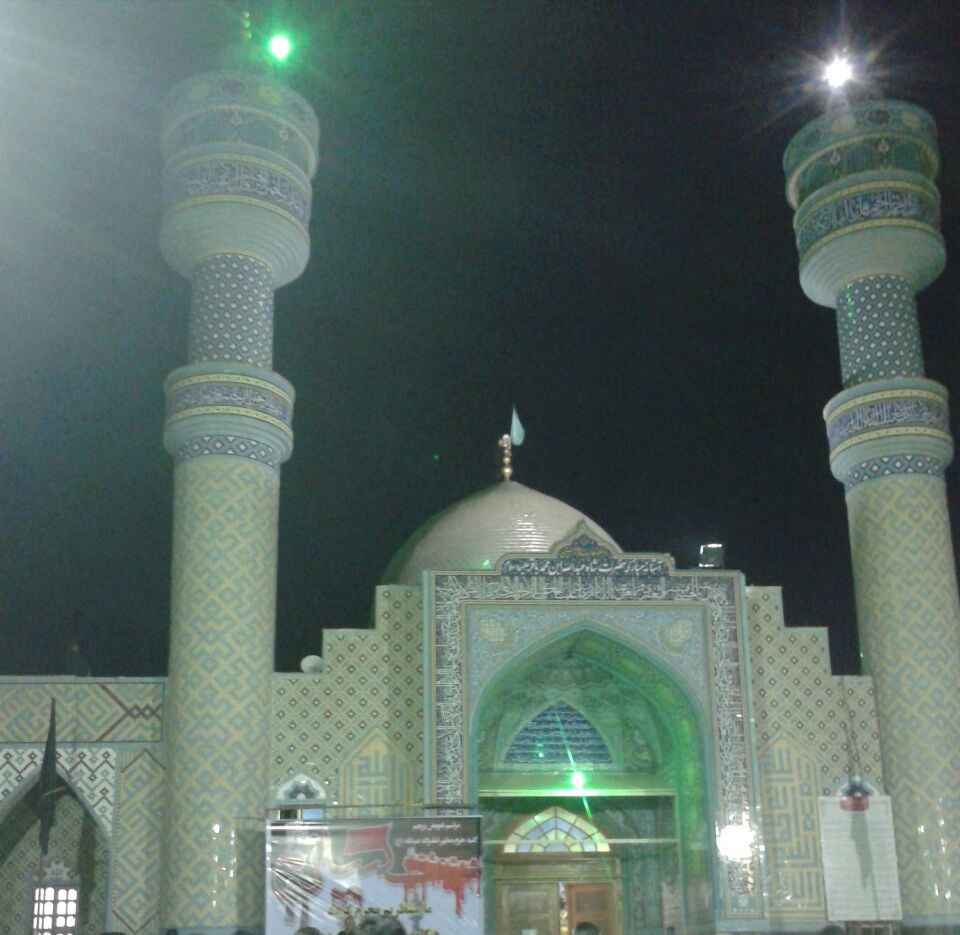 مزار اقدس سید شاہ عبداللہ دقدق بن امام باقر العلوم علیہ السلام